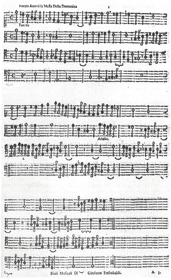 First page of Girolamo Frescobaldi's Toccata avanti la Messa della Domenica, first pieces from Fiori musicali (1635).